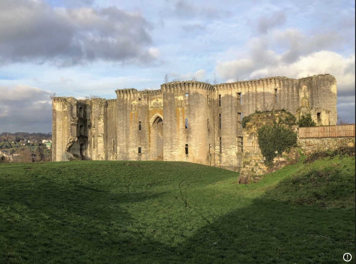 Façade du château Louis d'Orléans à La Ferte-Milon.